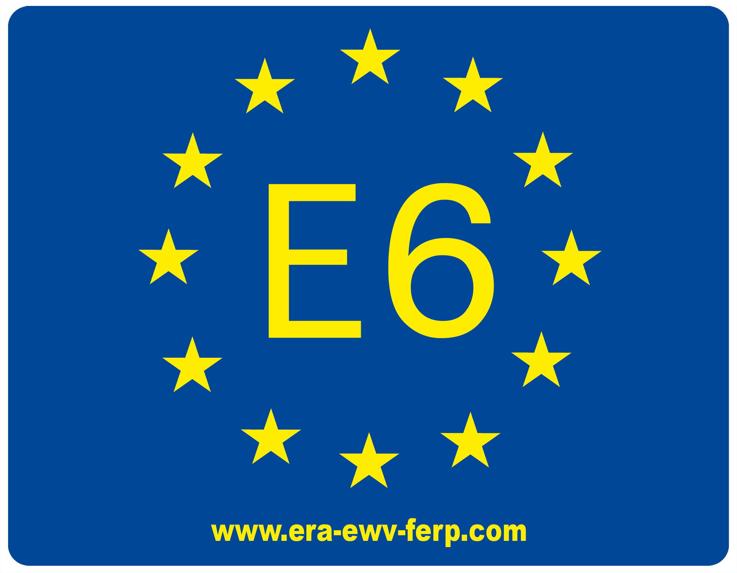 Zeichen des Europäischen Fernwanderwegs E6